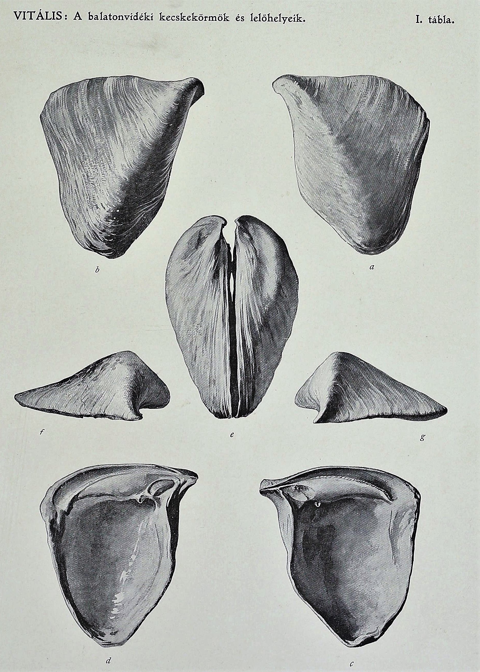 Congeria ungula caprae Kecskeköröm Vitális István: A balatonvidéki kecskekörmök és lelőhelyeik Páros teknőjű példány az eredeti nagyság 5/6-ában. — a a jobb, b a baloldali teknő kívülről; c a jobb, d a baloldali teknő belülről; e a páros teknő a hasi táj felől; f a jobb, g a bal teknő elülről.